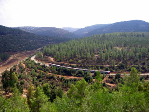 train to jerusalem שומבלע